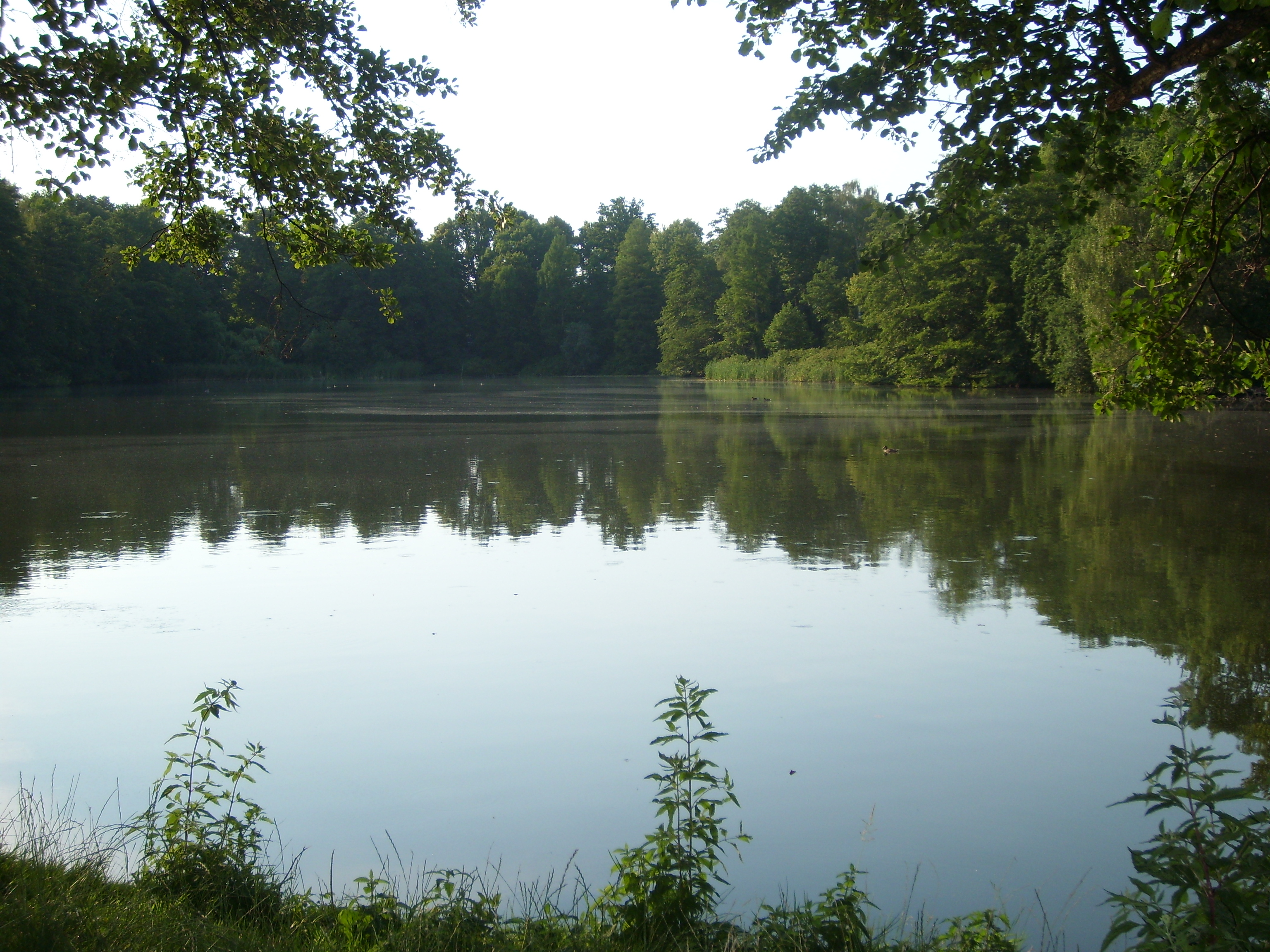 Waldsee Berlin-Hermsdorf